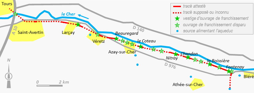 Tracé de l'aqueduc gallo-romain de Fontenay (Indre-et-Loire) en rouge : points de passage attestés ; en vert : vestiges visibles.